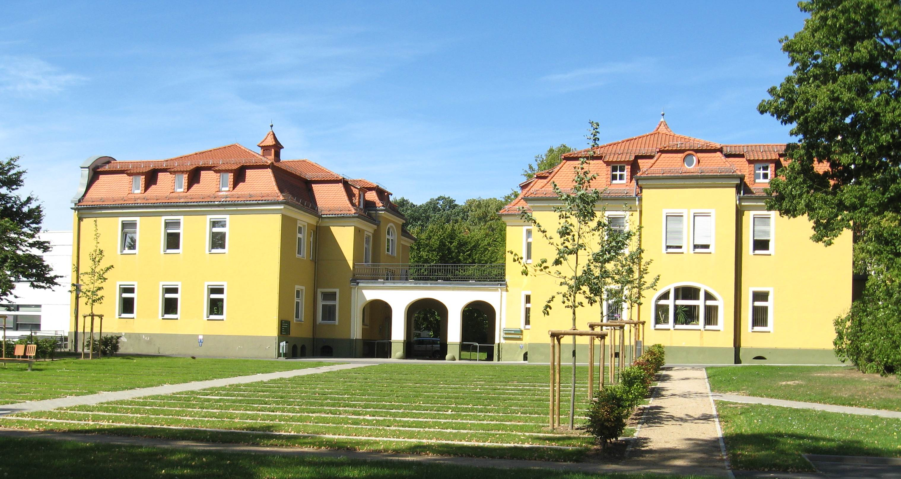 Justus-Liebig-Universität Gießen Campus der Rechts- und Wirtschaftswissenschaften